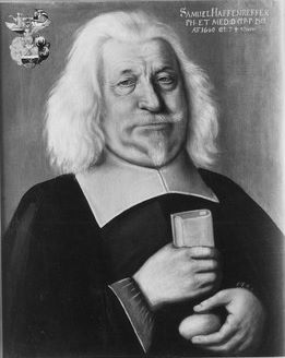 Bild in der Tübinger Professorengalerie